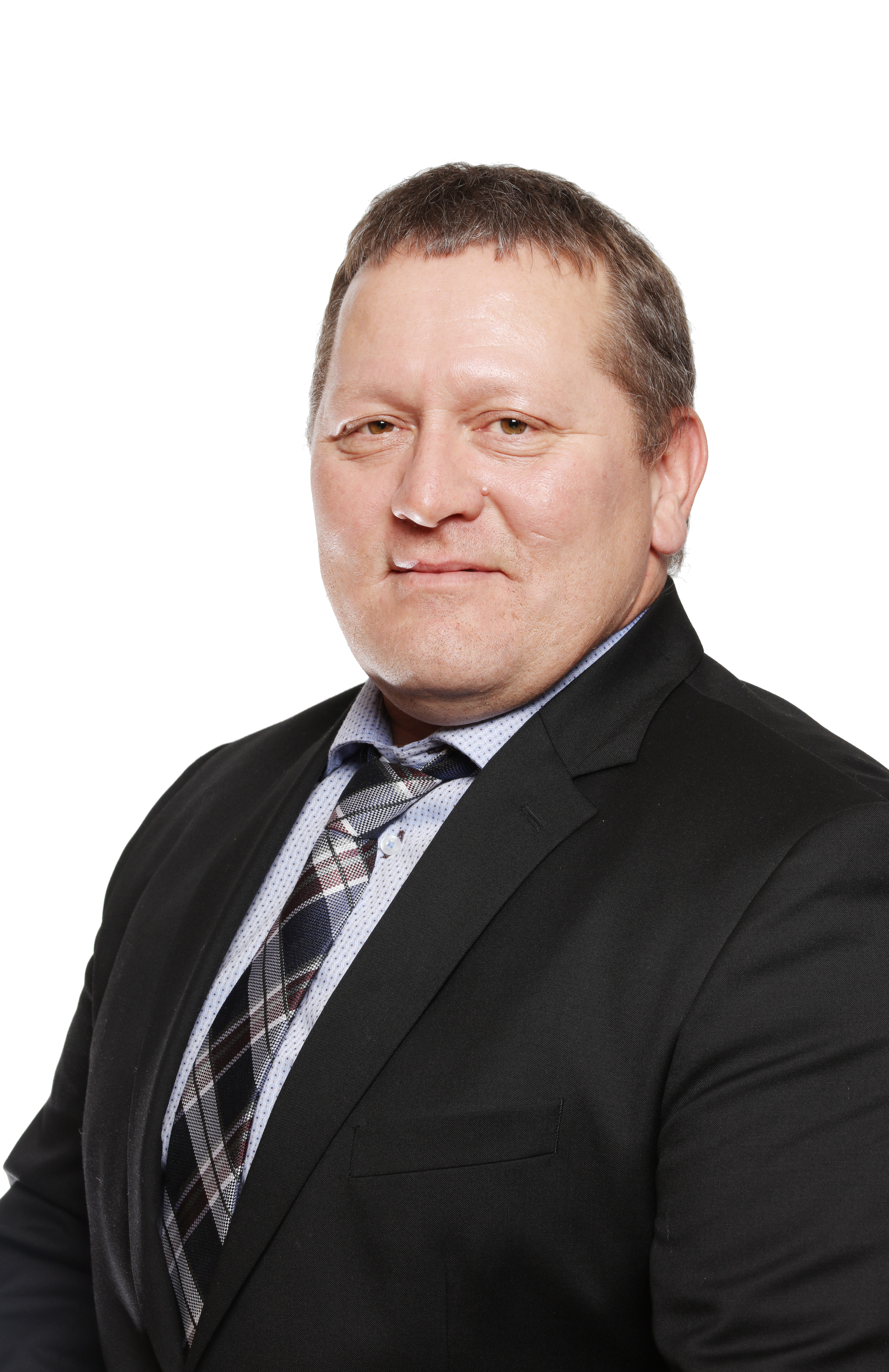 Mikkola, Tor H. (Foto: Kenneth Hætta)